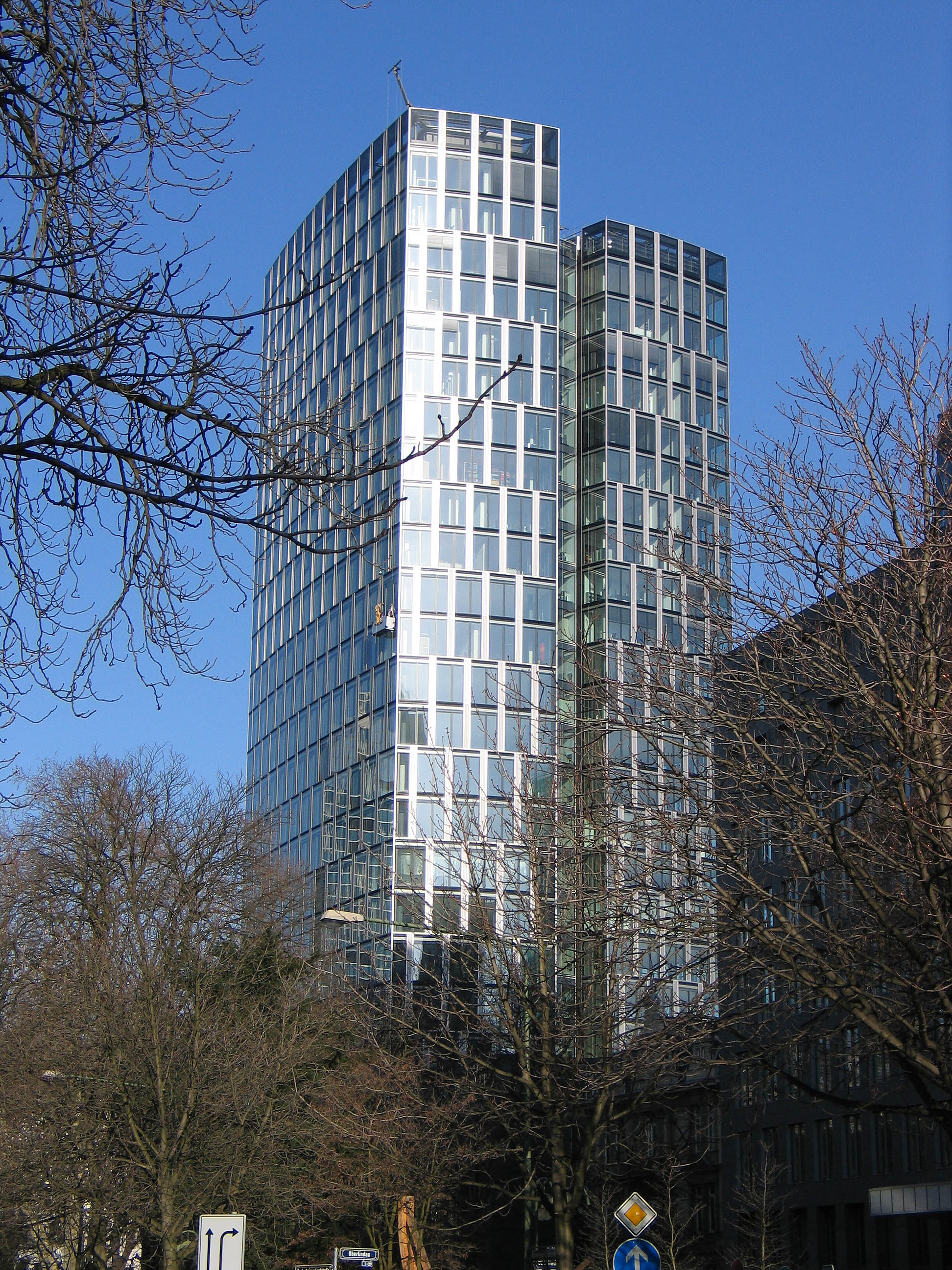 WestendDuo, Westend, Frankfurt am Main Photograph: Luidger (10. März 2007)